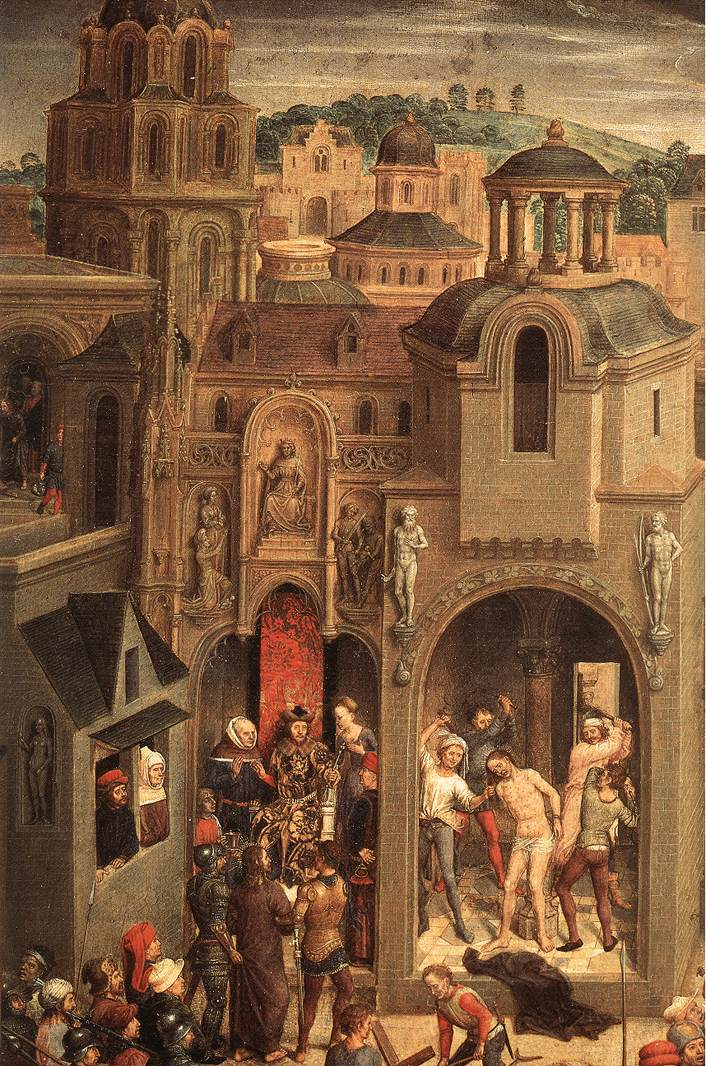 detail